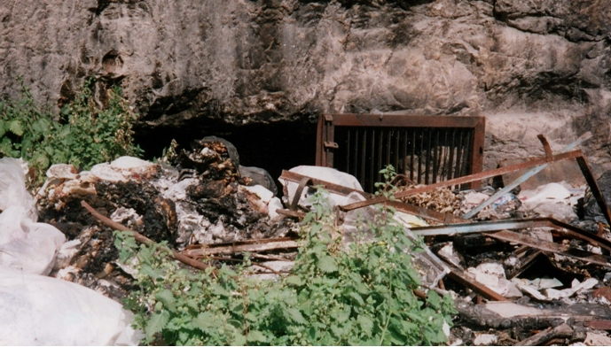 פתח אחת ממערות הגניזה בבית הקברות סמבוסקי בירושלים, 1995.